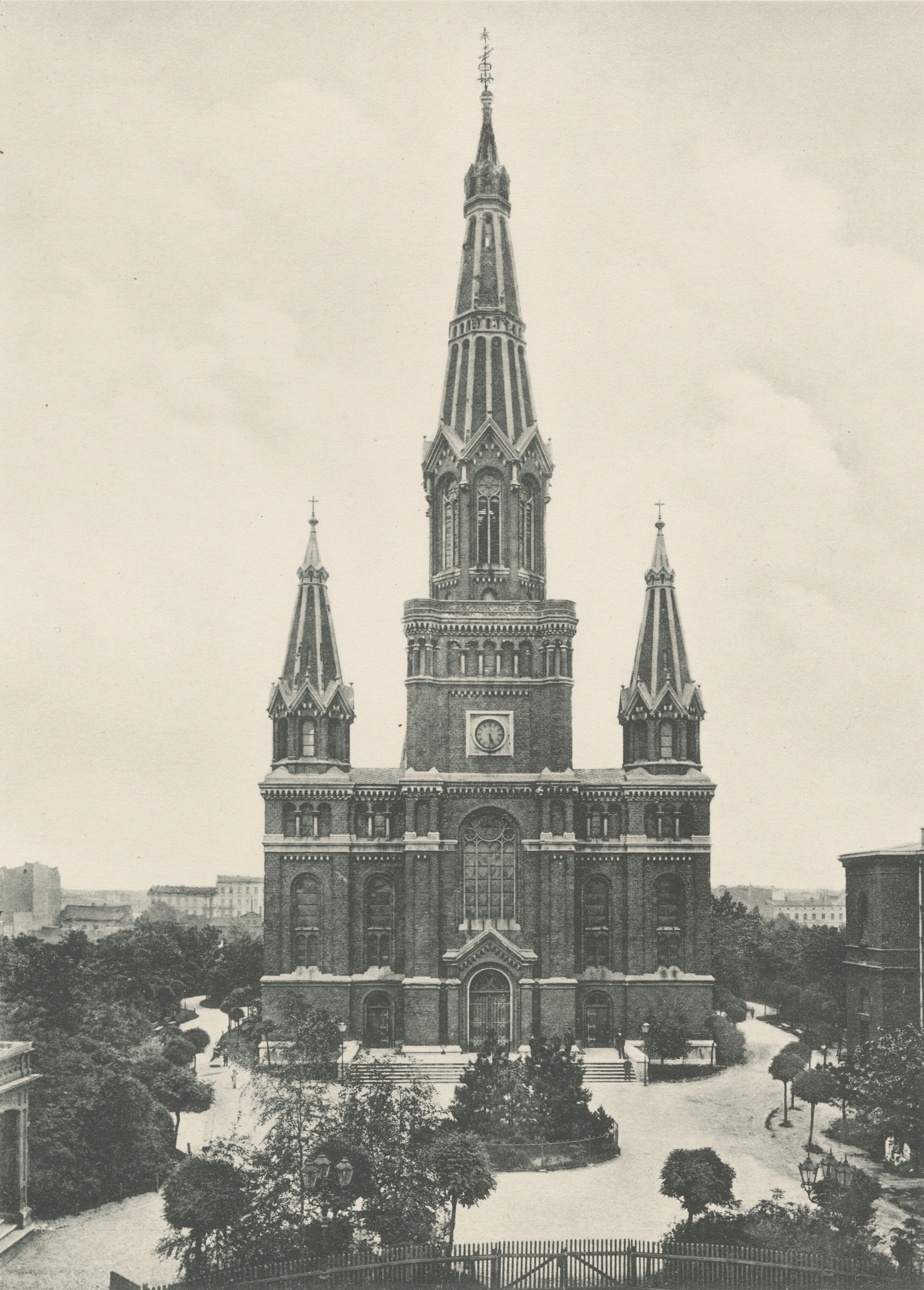 Fotografia Bronisława Wilkoszewskiego z albumu „Widoki m. Łodzi” z 1896 roku przedstawiająca kościół ewangelicki św. Jana Ewangelisty, mieszczący się przy ówczesnej ul. Dzikiej (ob. Sienkiewicza) u wylotu ul. Ewangelickiej (ob. Roosevelta). Kościół ten był drugim w Łodzi kościołem ewangelickim, po kościele św. Trójcy przy Nowym Rynku (ob. Plac Wolności). Budowa świątyni związana była ze wzrastającą liczbą mieszkańców miasta wyznania ewangelicko-augsburskiego. Potrzeba powstania nowej świątyni pojawiła się już w latach 60. XIX wieku. Dzięki pomocy finansowej łódzkich przemysłowców, w tym znacznego wkładu Karola Scheiblera w wysokości 50 tys. rubli udało się rozpocząć prace projektowo-budowalne. Projekt kościoła wykonał w 1879 roku niemiecki architekt Ludwik Schreiber, zatrudniony w zakładach Karola Scheiblera. Prace nad budową kościoła przejął, po opuszczeniu Łodzi przez Scheiblera w 1880 roku, architekt miejski Hilary Majewski. Kościół św. Jana Ewangelisty zaprojektowany i wykonany został jako bazylika trójnawowa w stylu neoromańskim. Charakterystyczna dla niego jest elewacja wykonana z nieotynkowanej cegły (Rohbau) oraz fasada z trzema wieżami, z widocznie dominującą nad zabudowaniami miejskimi smukłą wieżą środkową. Budowa świątyni ukończona została w 1883 roku. Inauguracyjne nabożeństwo w nowym kościele, odprawił bp Paweł Everth w dniu 8 października 1884 roku. Pierwszym proboszczem został pastor Wilhelm Piotr Angerstein. Po II Wojnie Światowej świątynia została przejęta przez ojców jezuitów. W 1950 roku bp Michał Klepacz erygował parafię rzymskokatolicką pw. Najświętszego Imienia Jezus. Pod koniec lat 80. XX wieku ojcowie jezuici odkupili świątynię od Kościoła Ewangelicko-Augsburskiego. W czasach PRL-u kościół był ośrodkiem duszpasterstwa akademickiego, z którym związana była działalność kapelana opozycji – o. Stefana Miecznikowskiego, uhonorowanego w 1992 tytułem Honorowego Obywatela Miasta Łodzi.